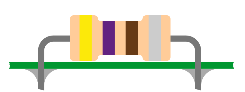 Perfil de soldadura para agujeros pasantes, donde se aprecia los conos de soldadura